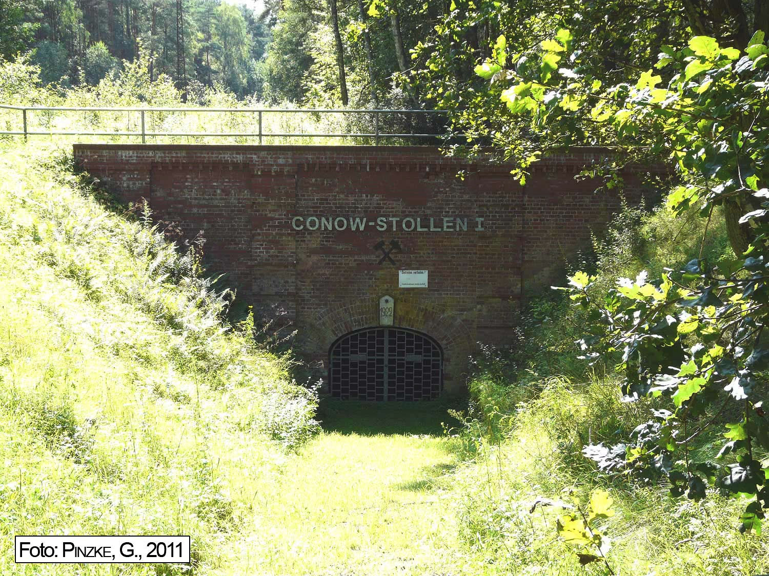 Eingang Conow-Stollen I